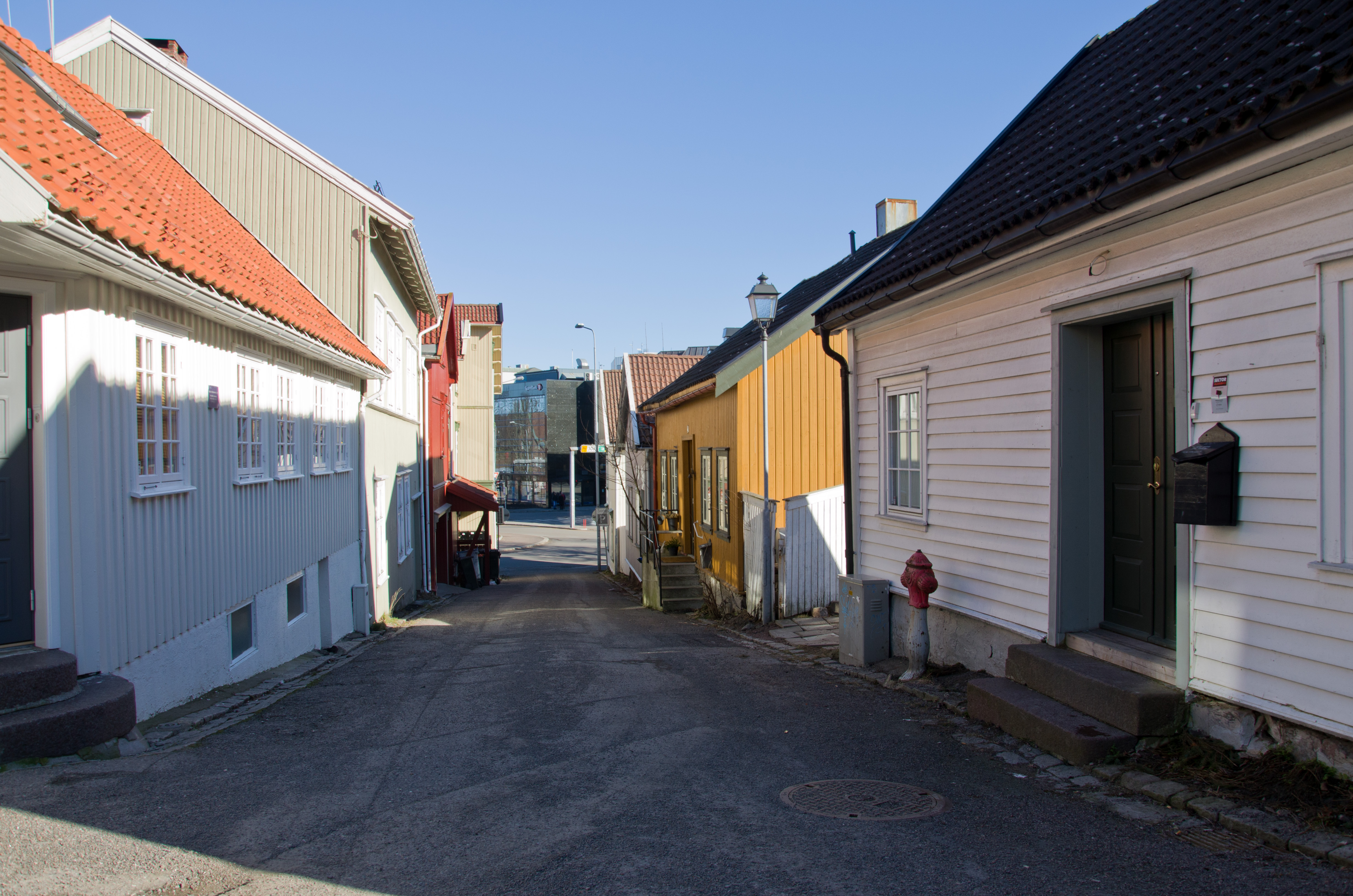 Reidar Sendemanns gate, Tønsberg